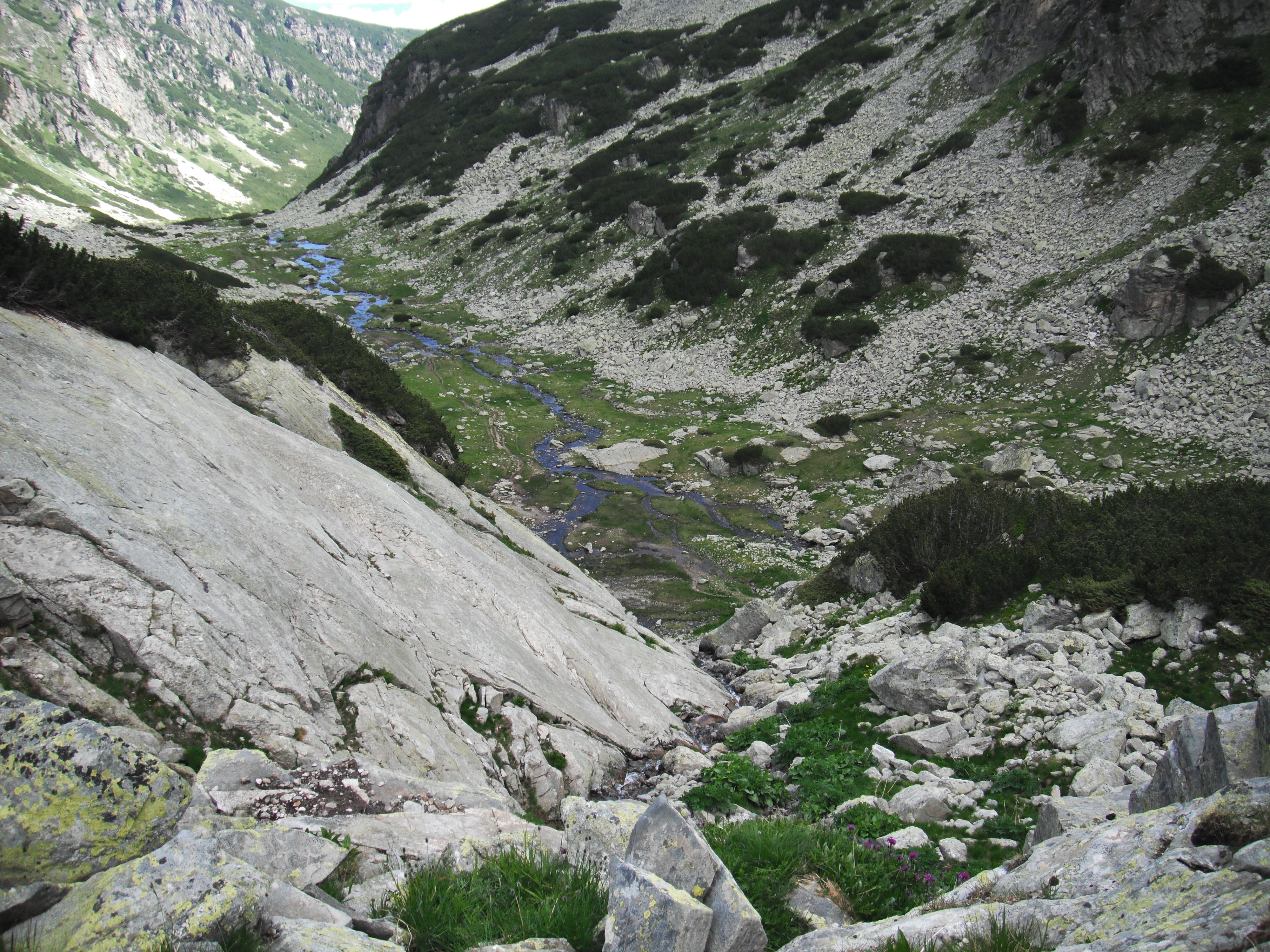 Рила, Рила